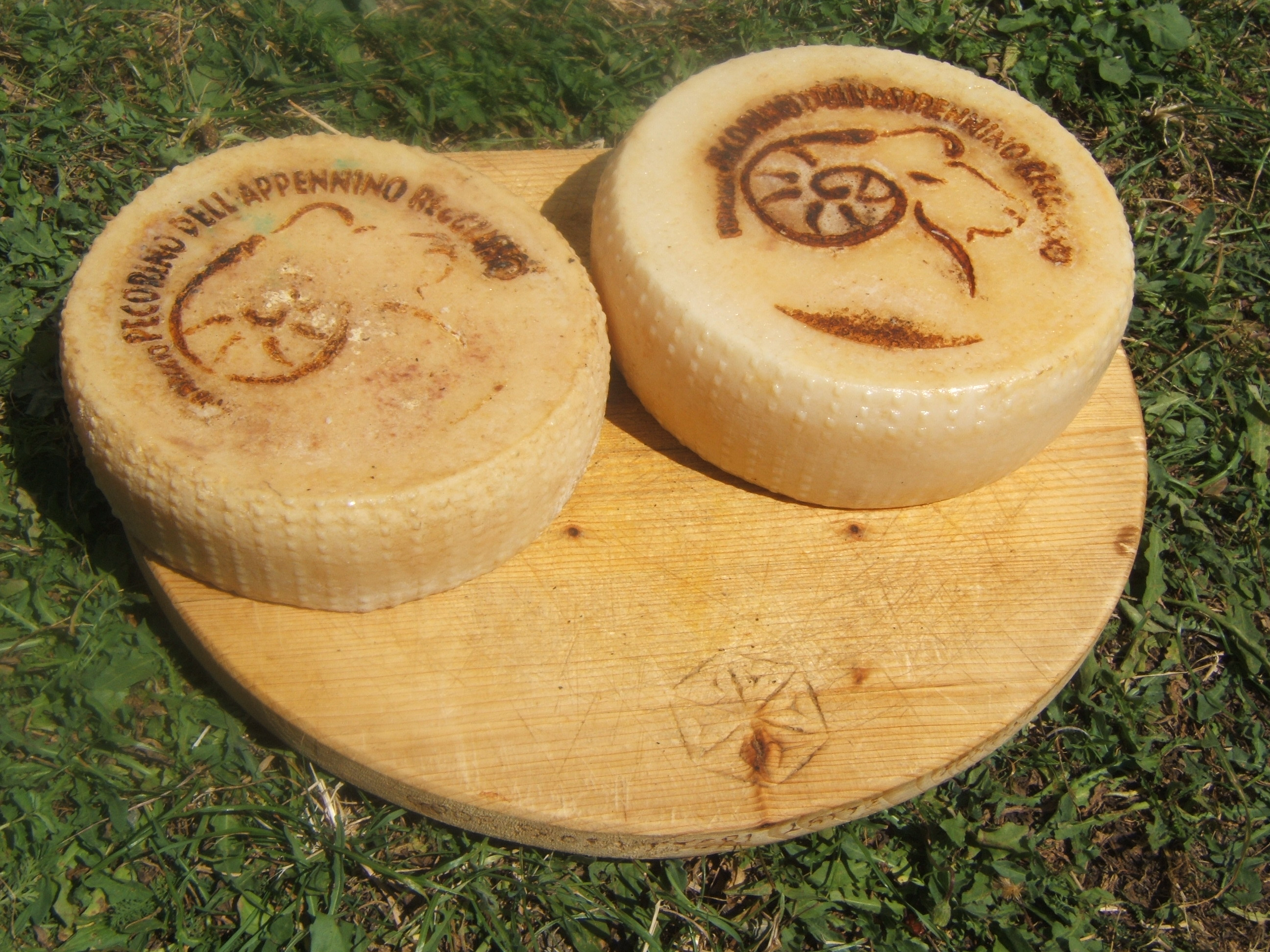 Pecorino dell'Appennino Reggiano prodotto a Succiso (Ramiseto, RE)